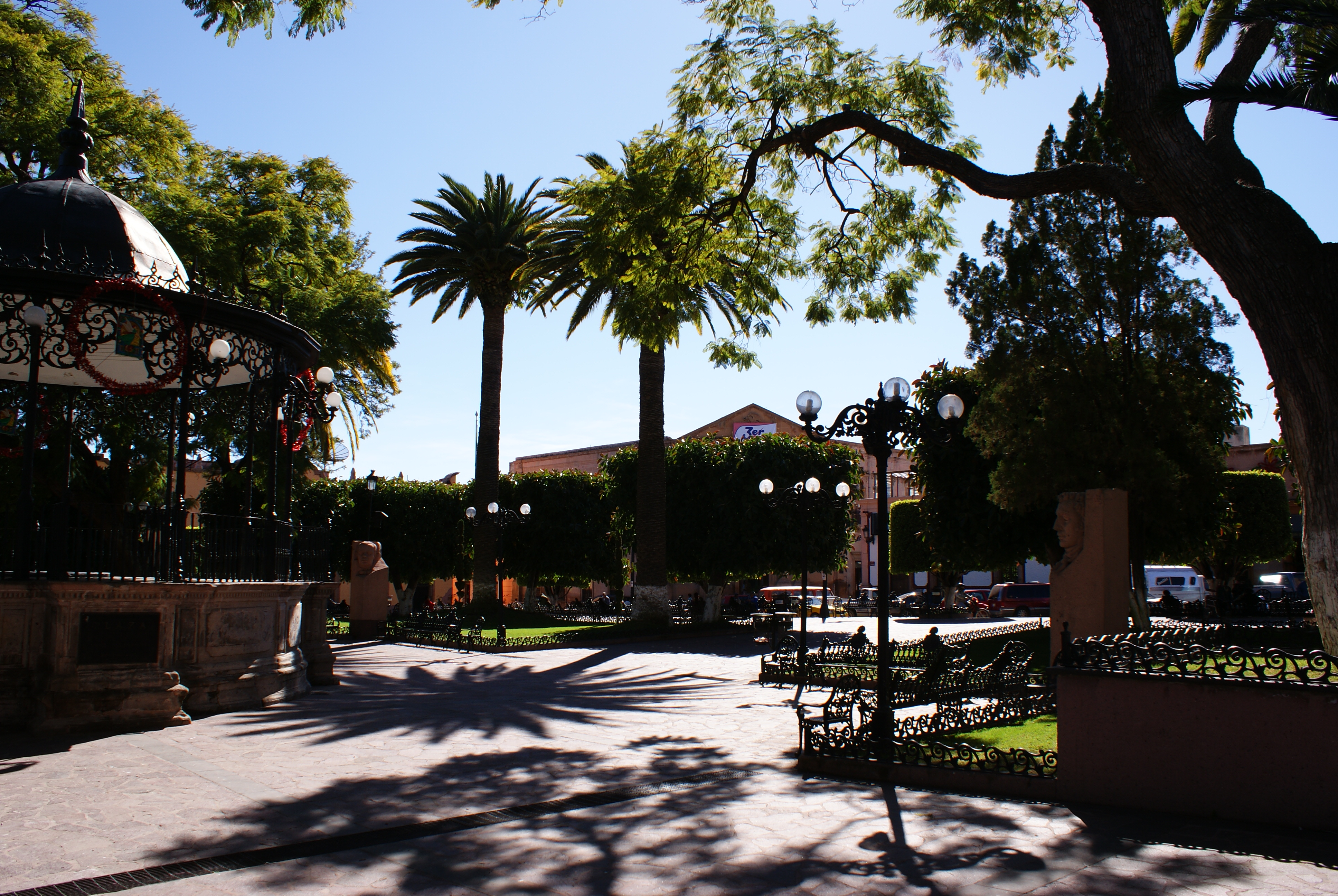 Jardín de los Constituyentes, Lagos de Moreno, Jalisco